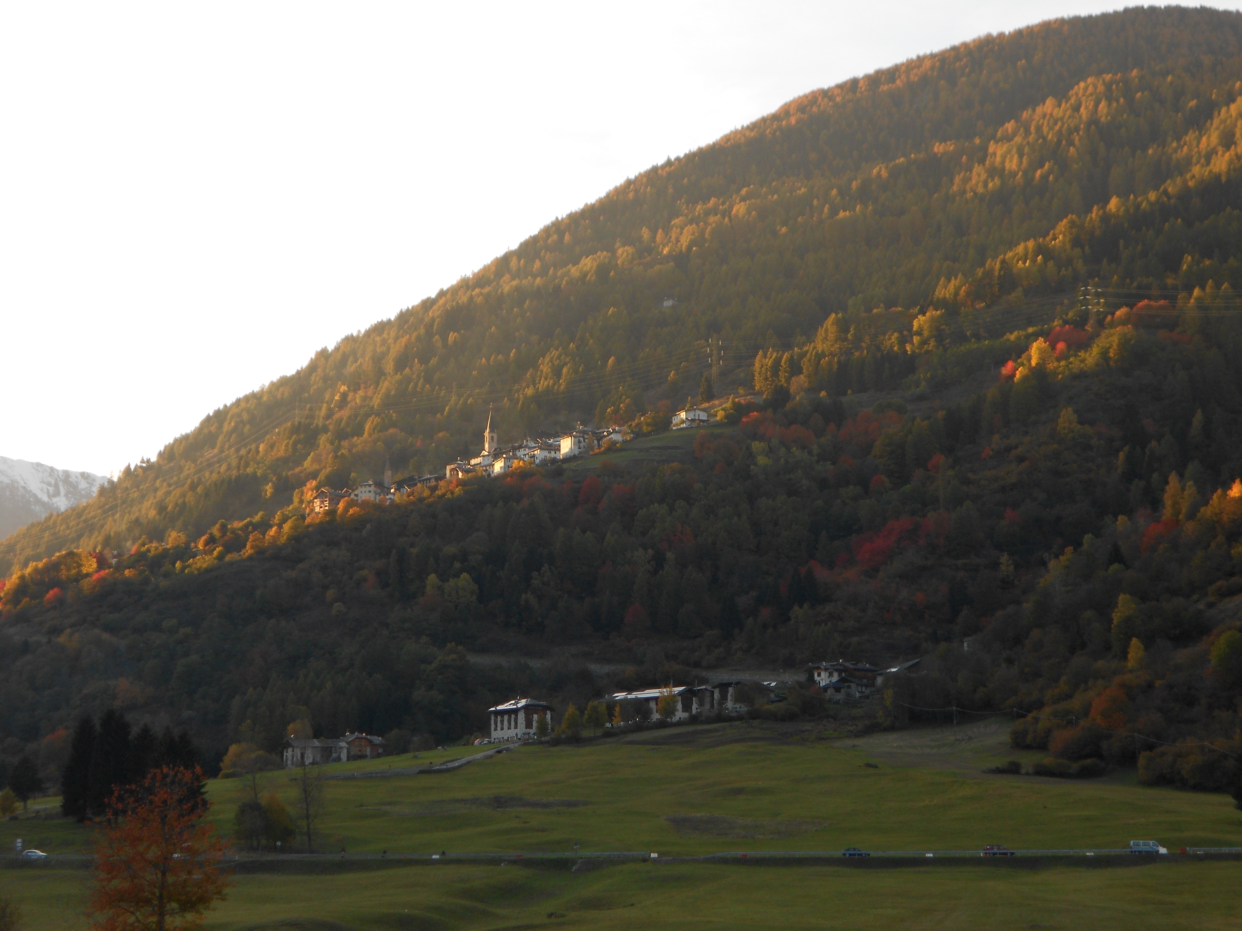 Lld: Tremenàch vist da Presenàch